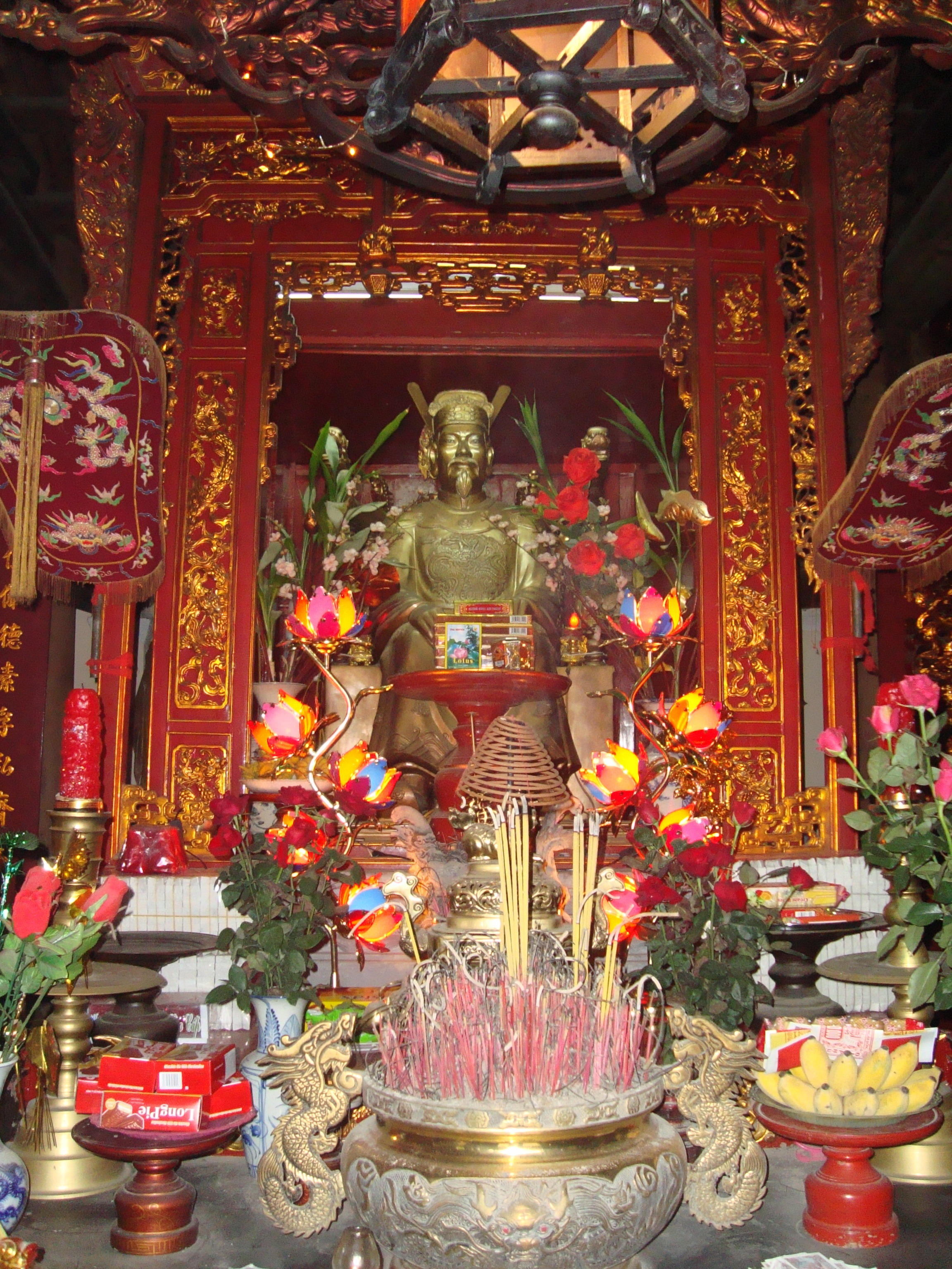 Tượng thờ Phùng Hưng tại đền thờ ông ở quê hương-làng Cam Lâm xã Đường Lâm thị xã Sơn Tây Hà Nội.